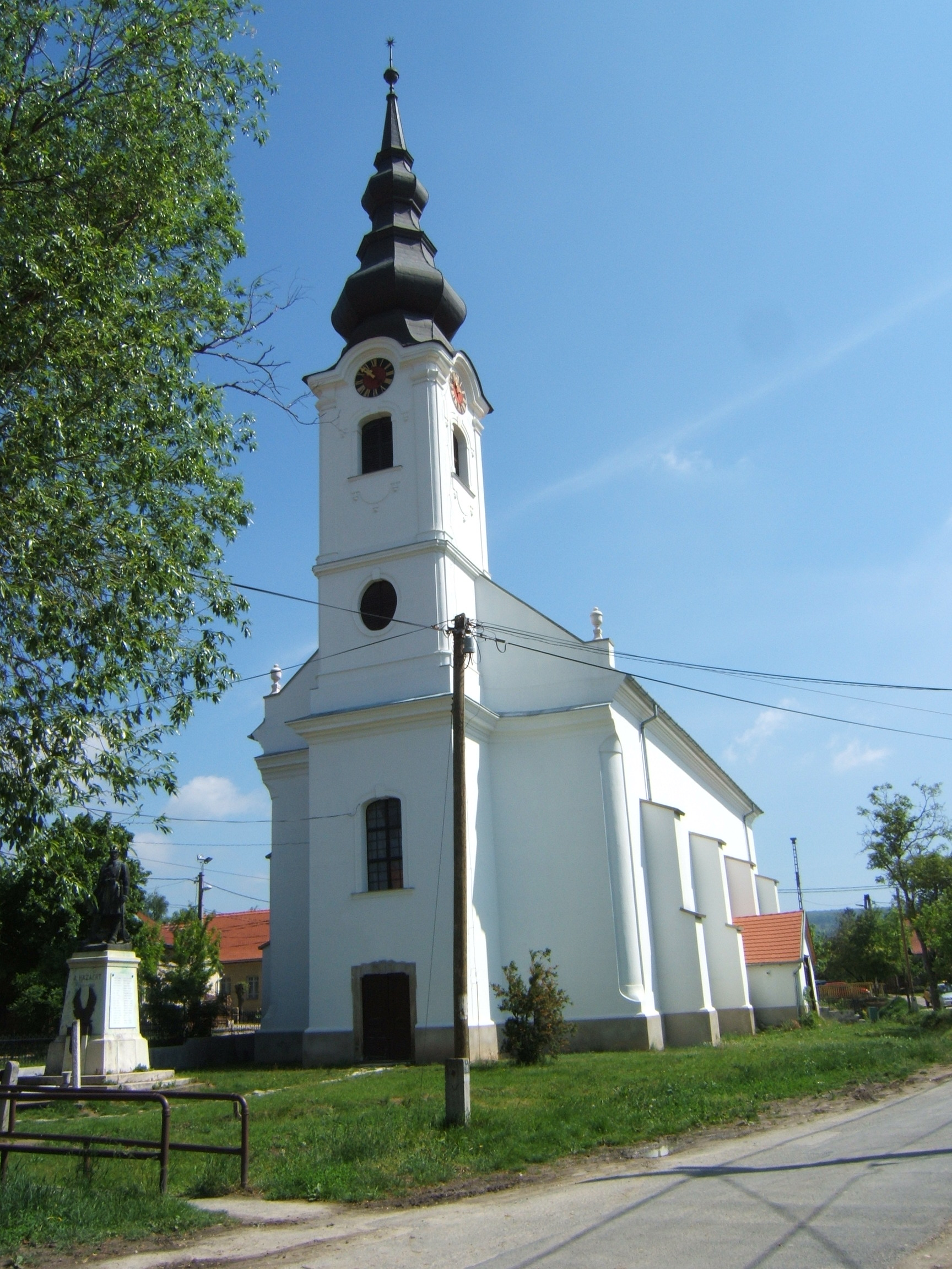 Páty, református templom